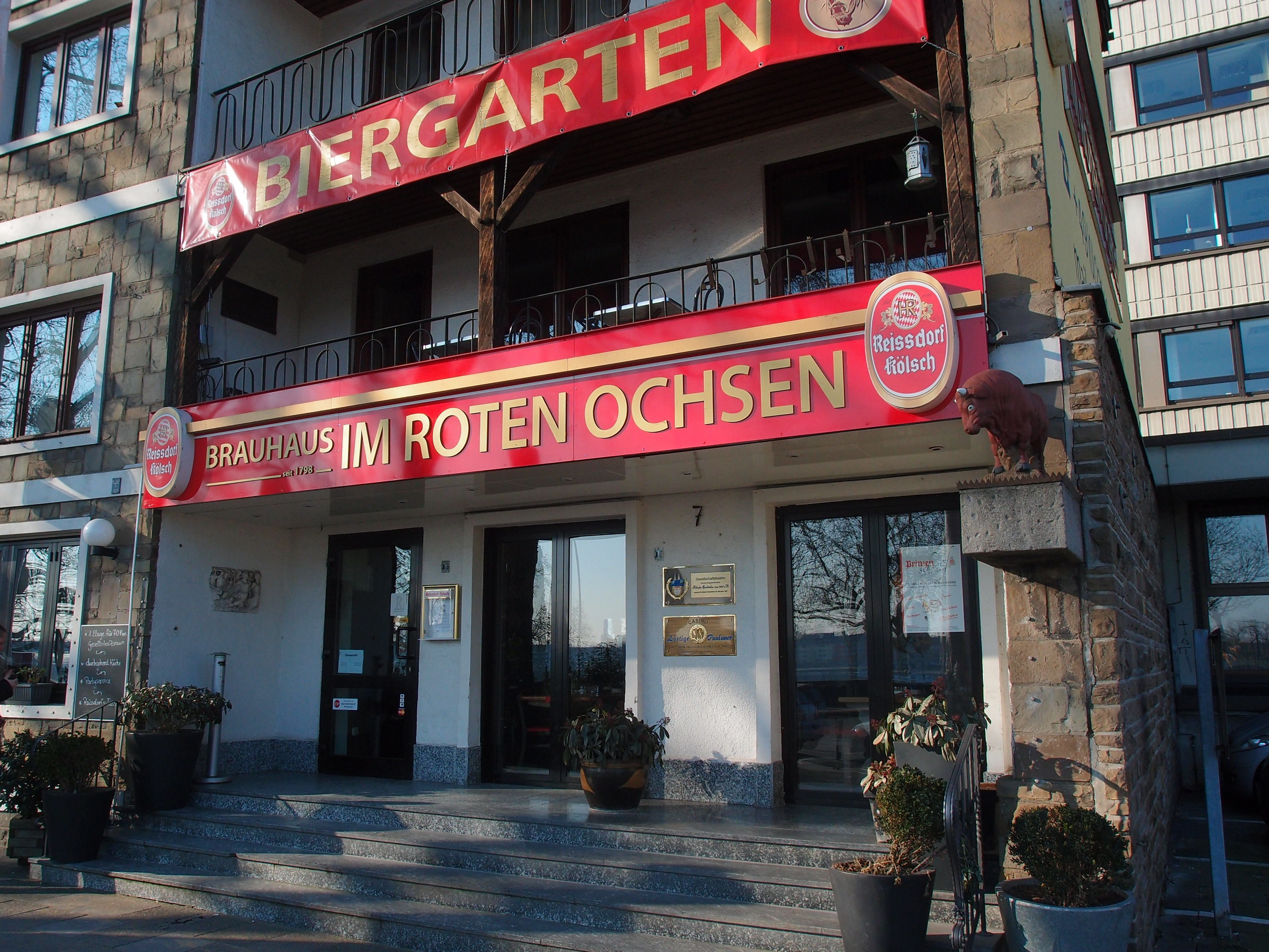 Brauhaus Im Roten Ochsen in Köln (seit 1798)